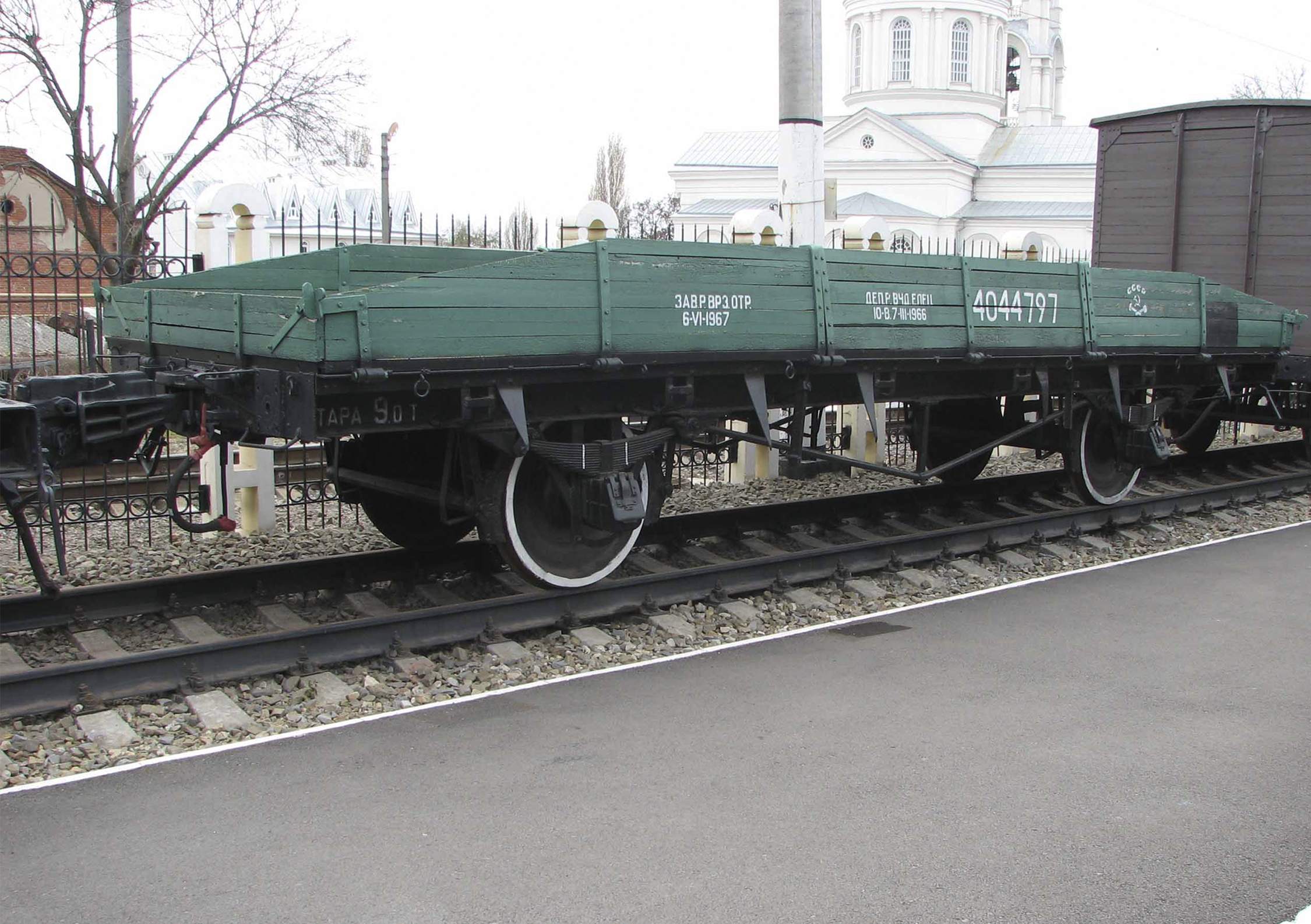 Платформа построена в 1920-х годах